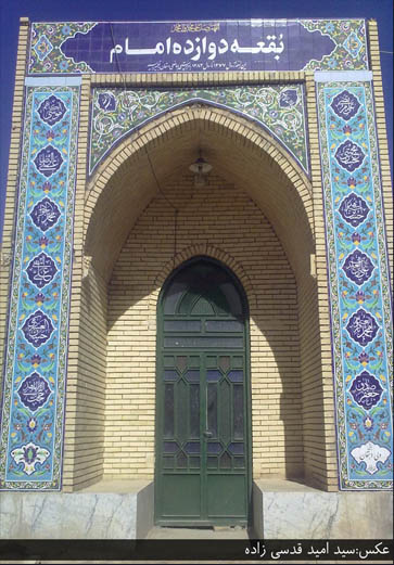 مقبره حاج قدسی یزدی(تاج الشعرا)